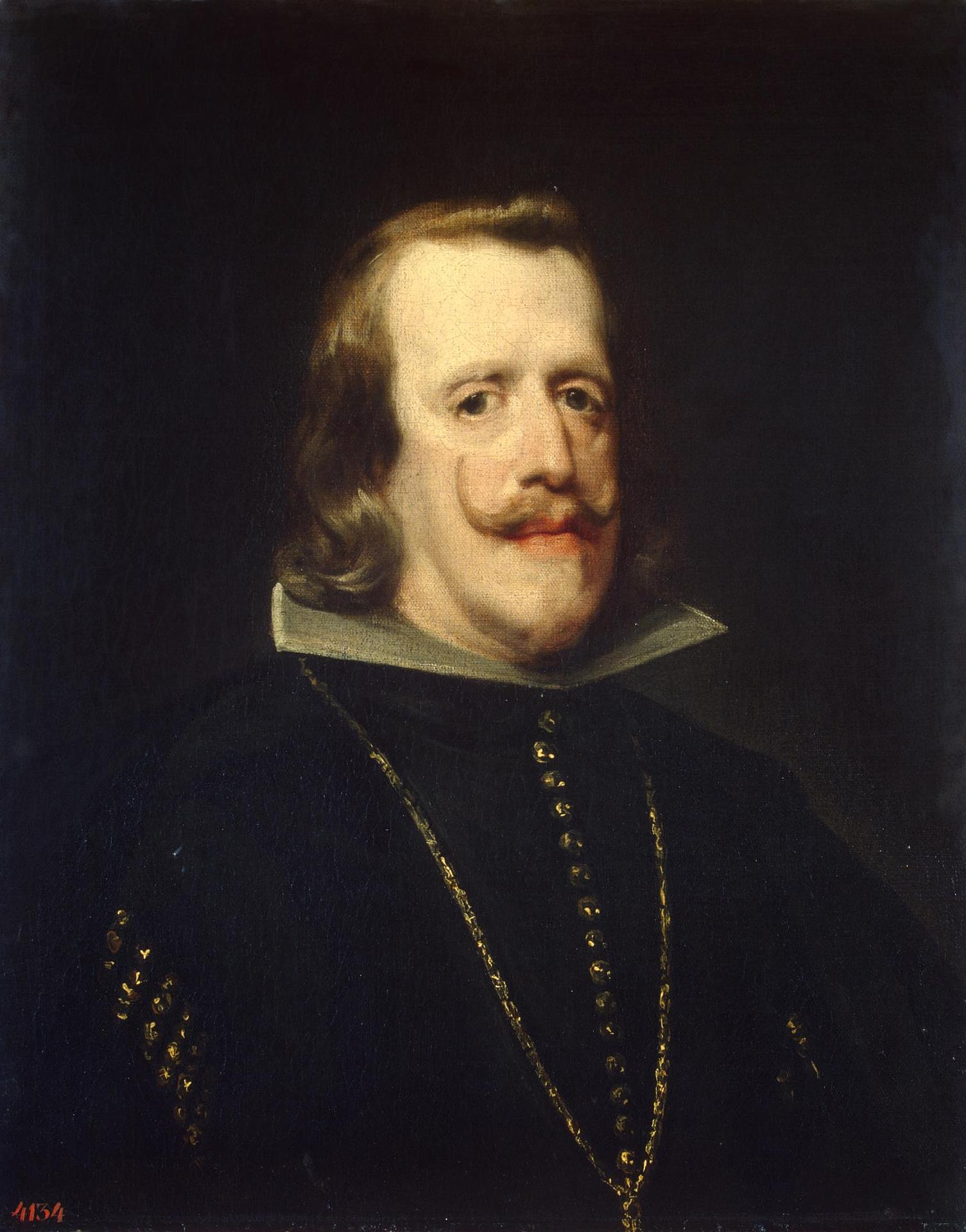 Felipe IV, óleo sobre lienzo, 67 x 54,5 cm, San Petersburgo, Museo del Hermitage